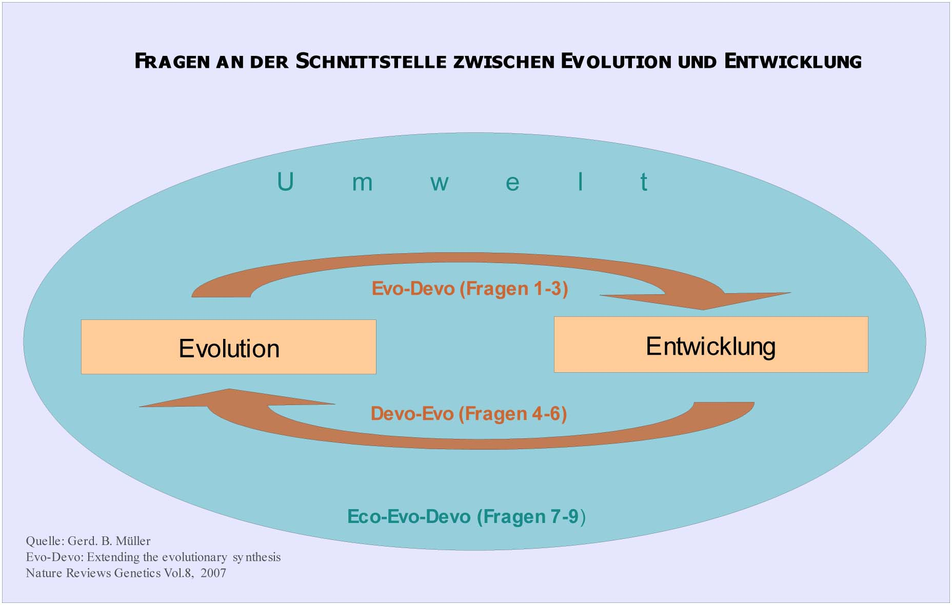 Eco-EvoDevo-Fragen